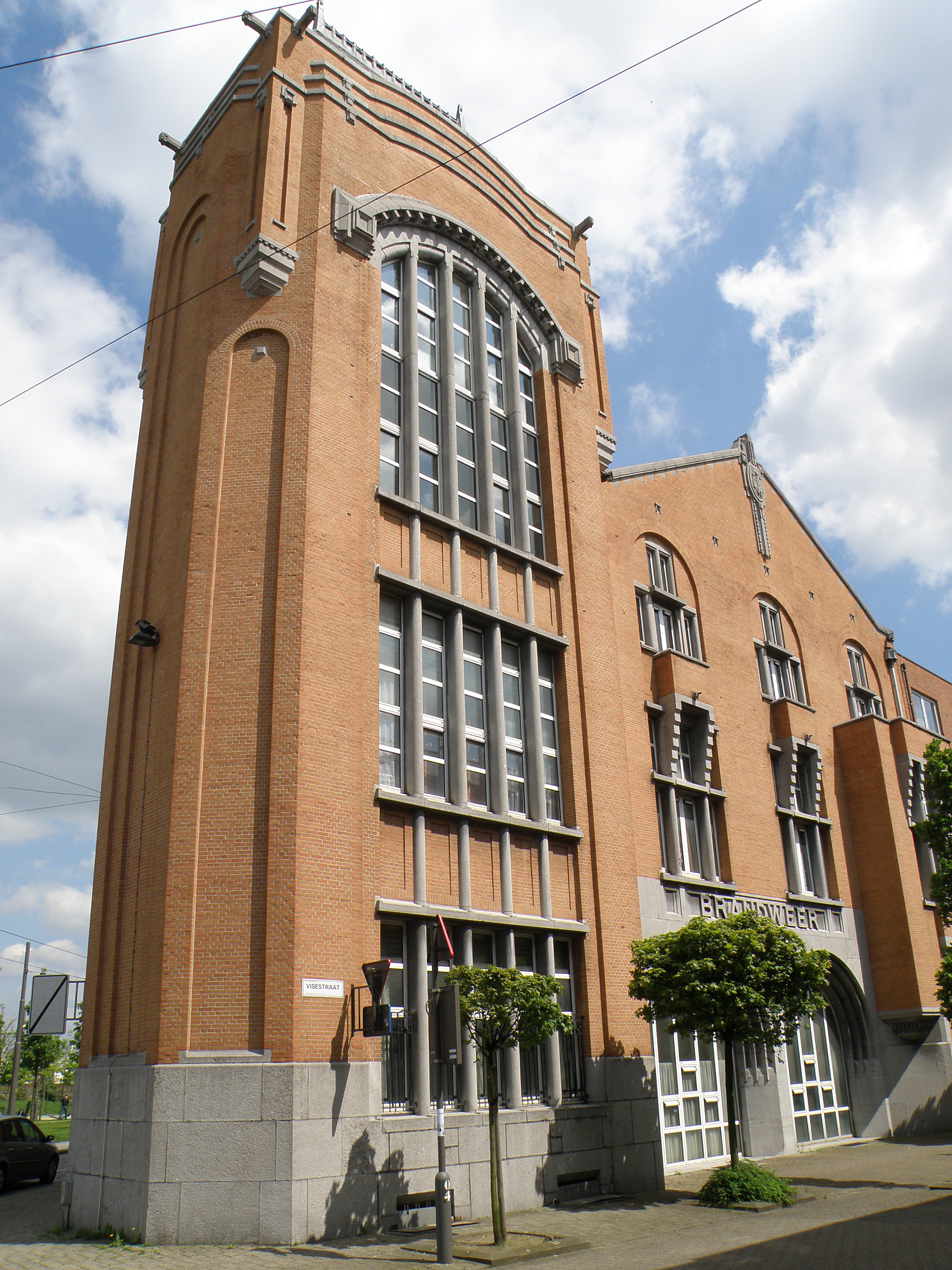 Antwerpen, België. Brandweerkazerne op de hoek Halenstraat - Viséstraat. Ontwerp van architect Emiel van Averbeke.